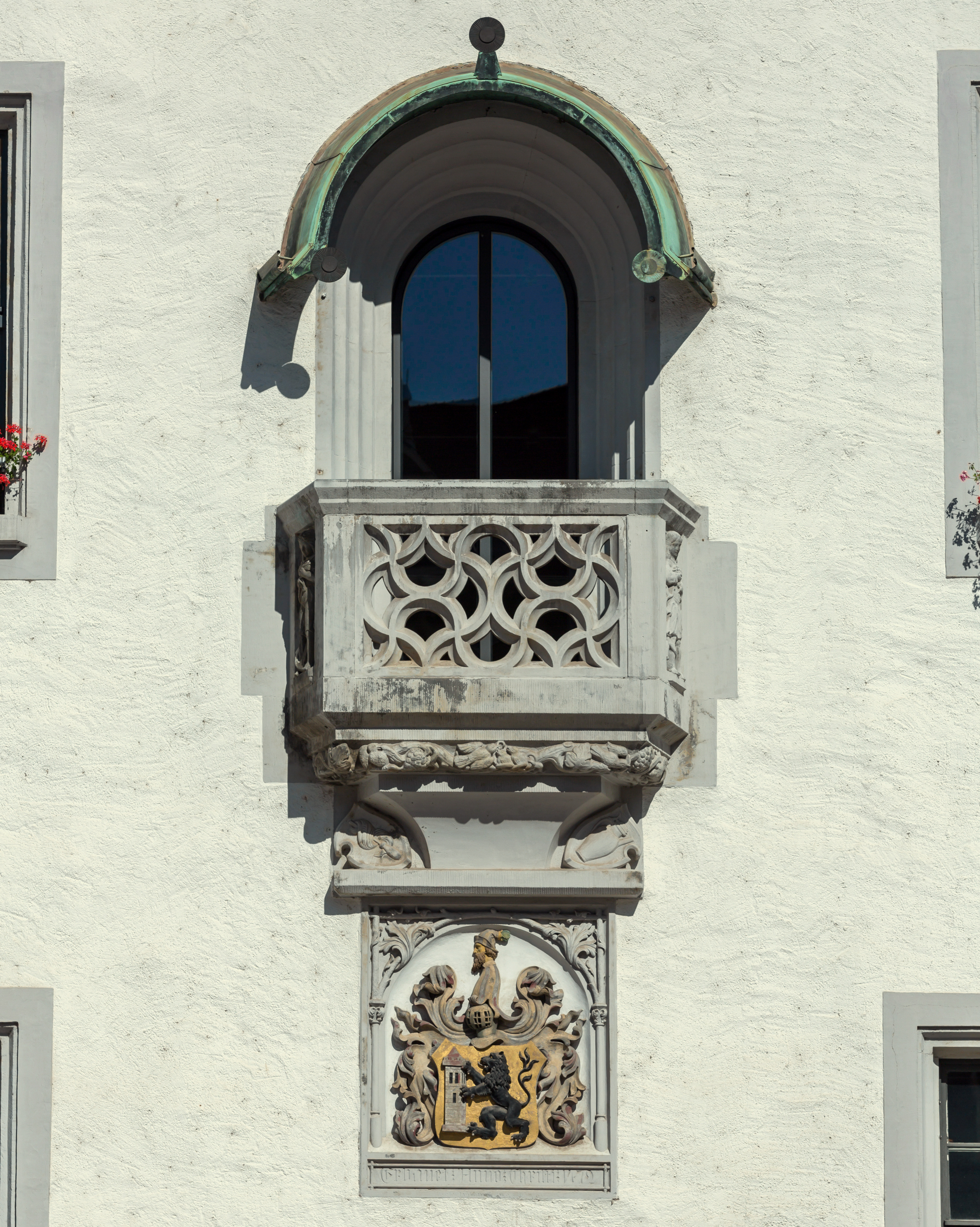 Meißen Markt 1 Rathaus von 1472–1486 in geschlossener Bebauung und Ecklage , Wappen (1865), Balkon (1910)